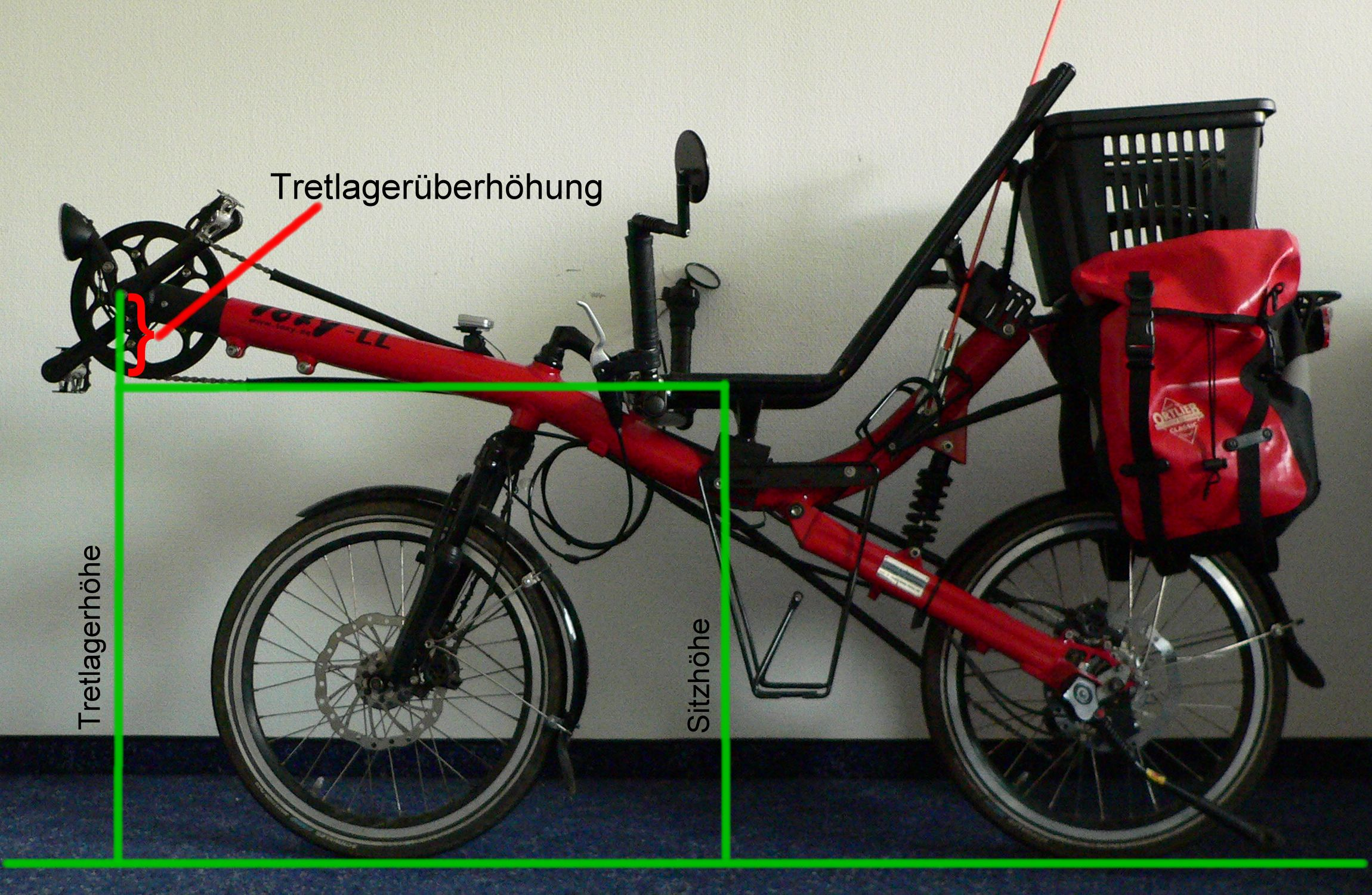 Tretlagerüberhöhung beim Liegerad